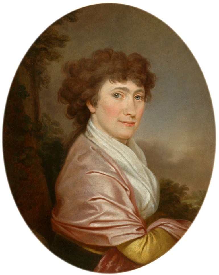 Графиня Анна Павловна Каменская, ур. Щербатова (1749—1826)